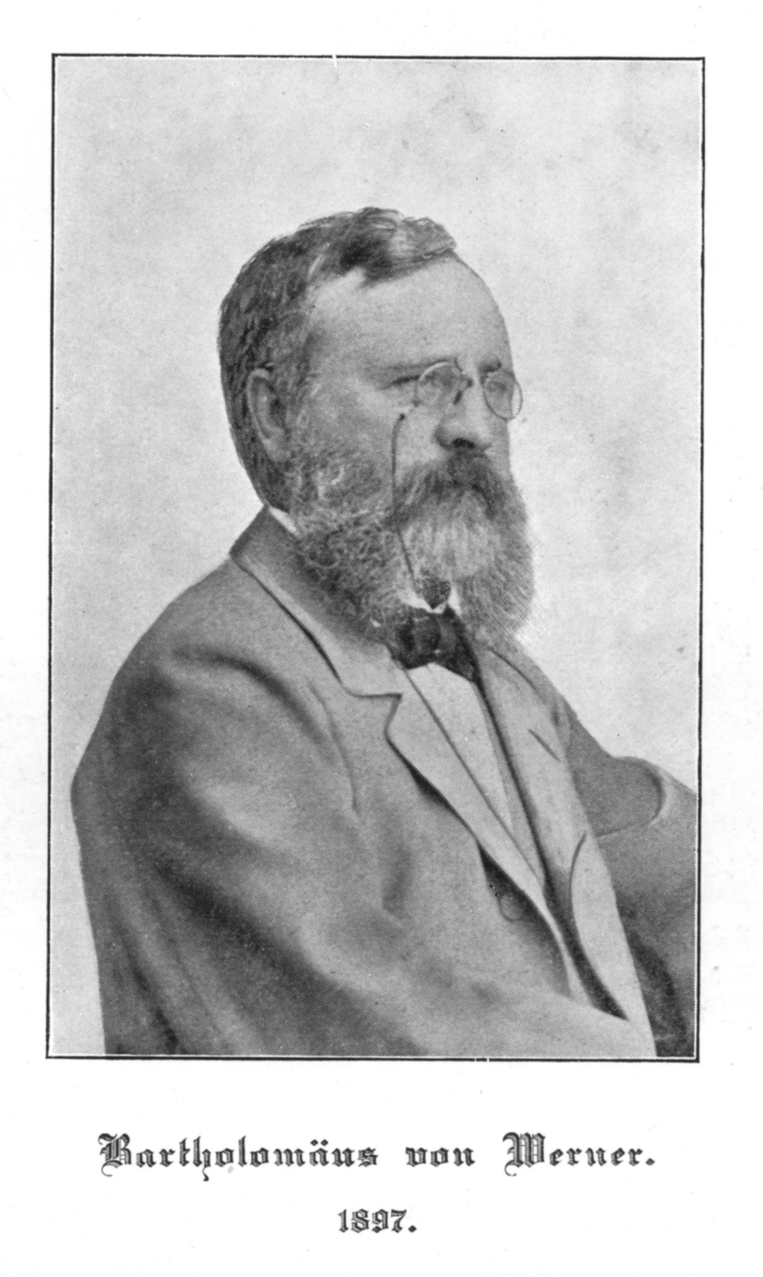 Portrait von Bartholomäus von Werner, 1897